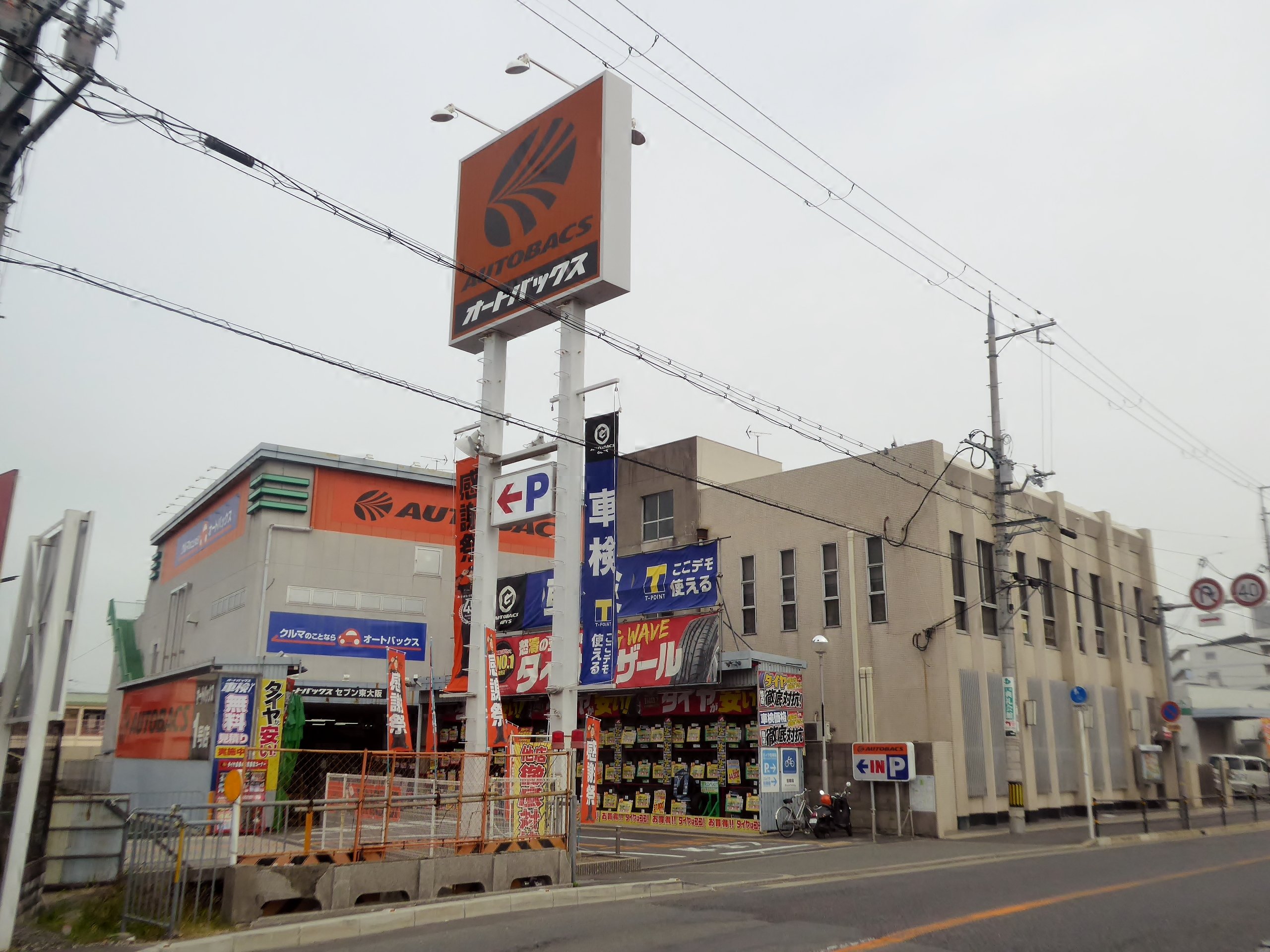 オートバックスセブン東大阪店を撮影。